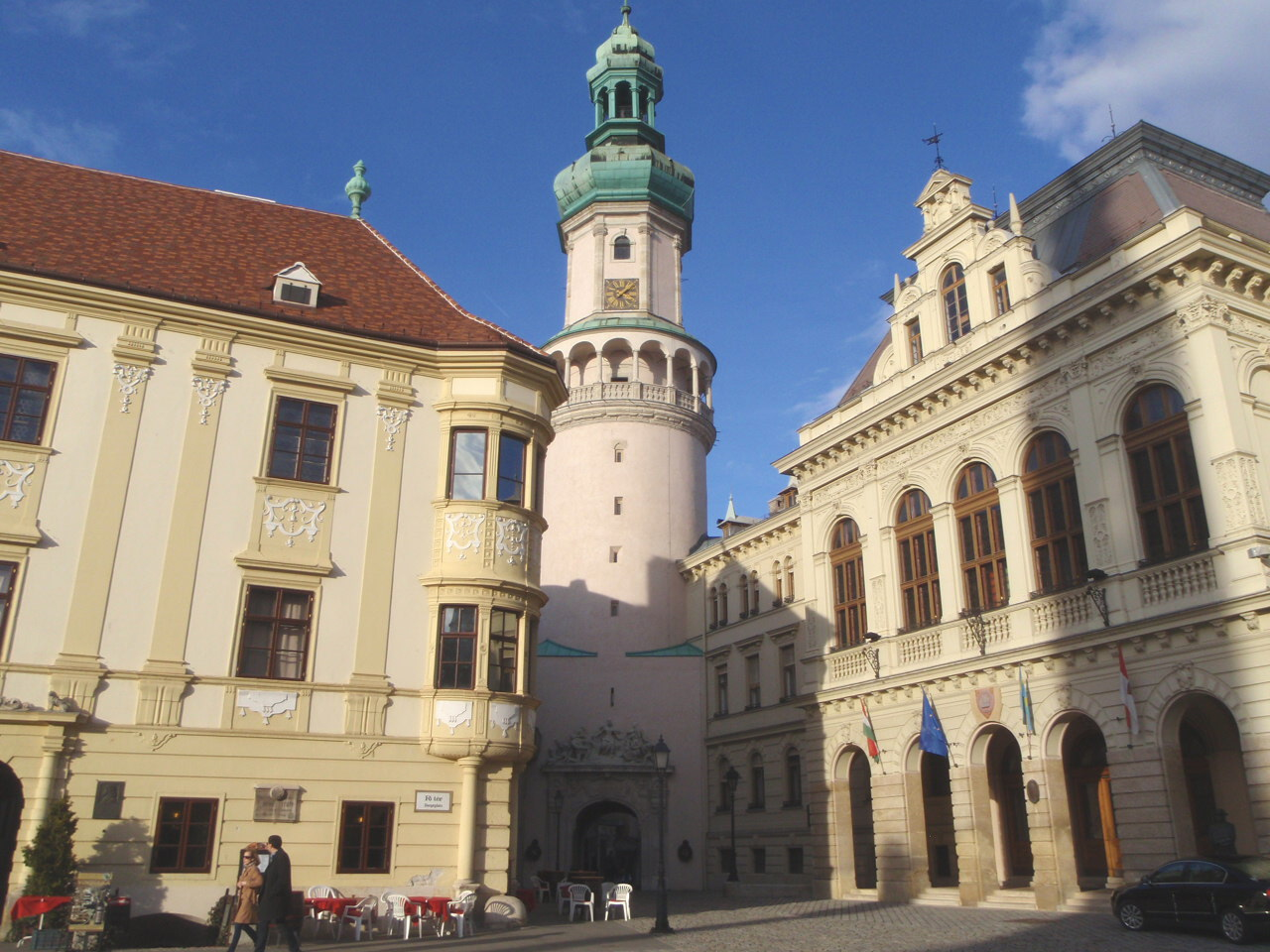 Megújult tűztorony